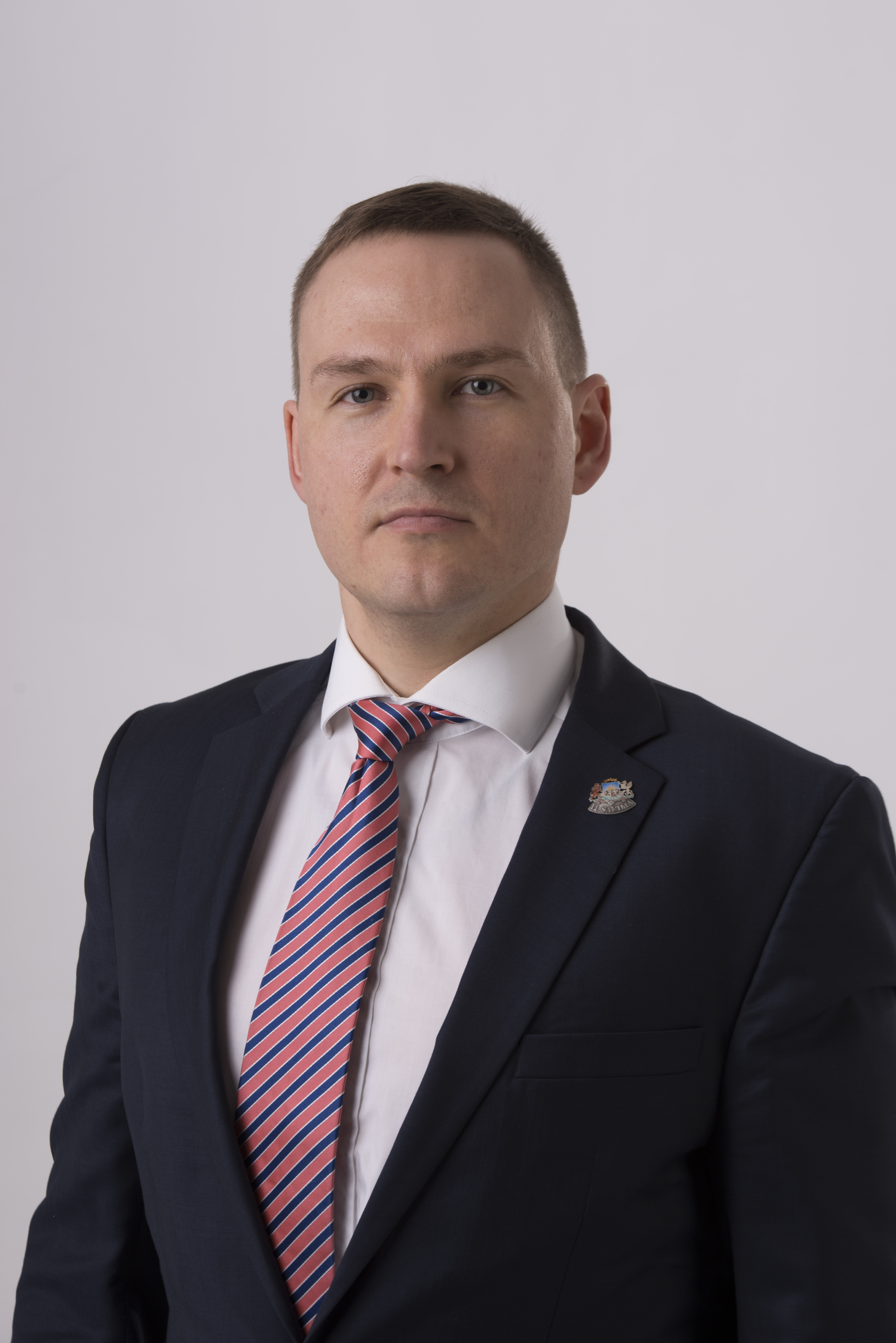 11.Saeimas deputāts Gatis Sprūds. Foto: Reinis Inkēns, Saeimas Kanceleja Izmantošanas noteikumi: saeima.lv/lv/autortiesibas